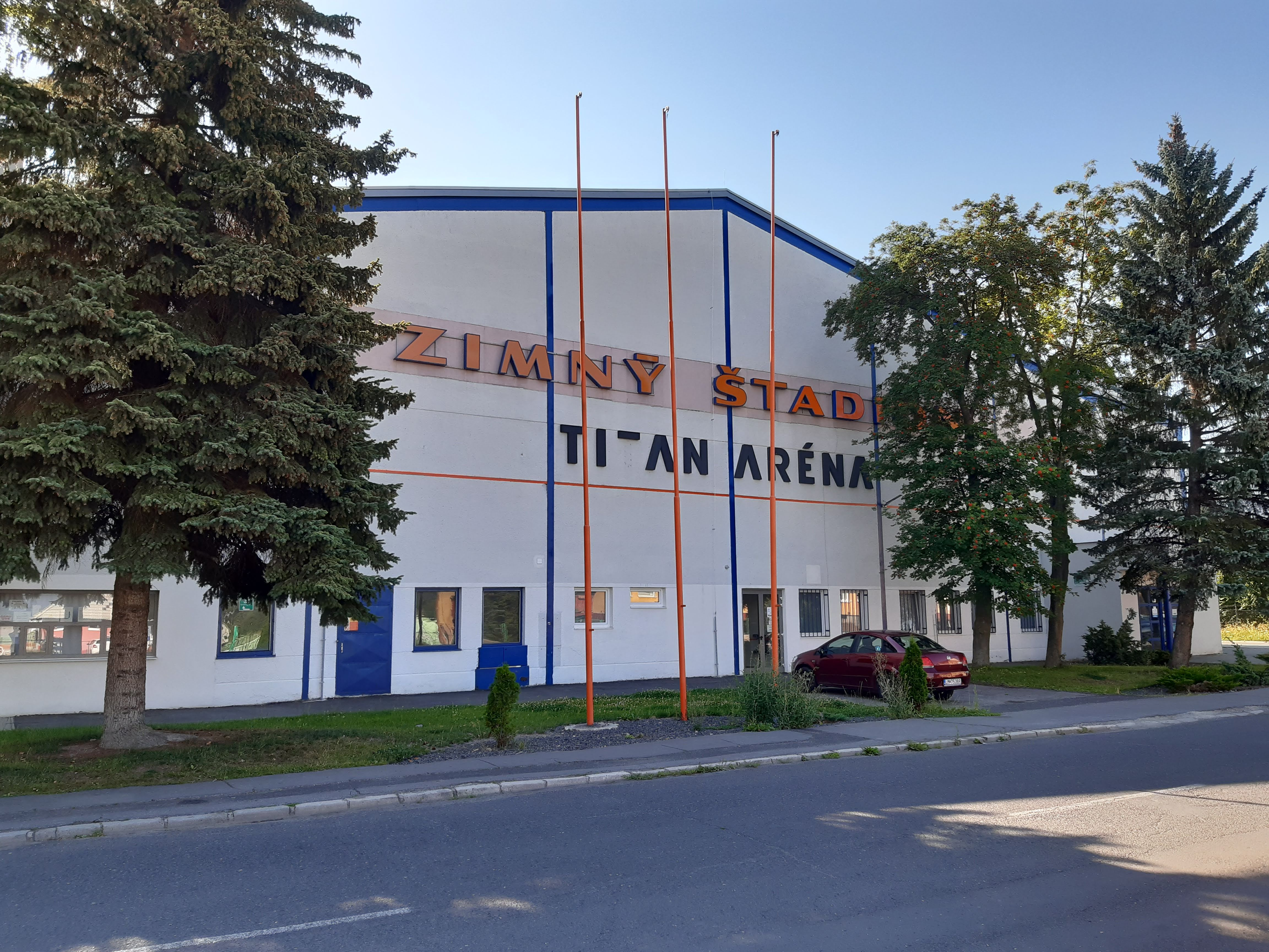 Zimný štadión v Liptovskom Mikuláši (Titan aréna).